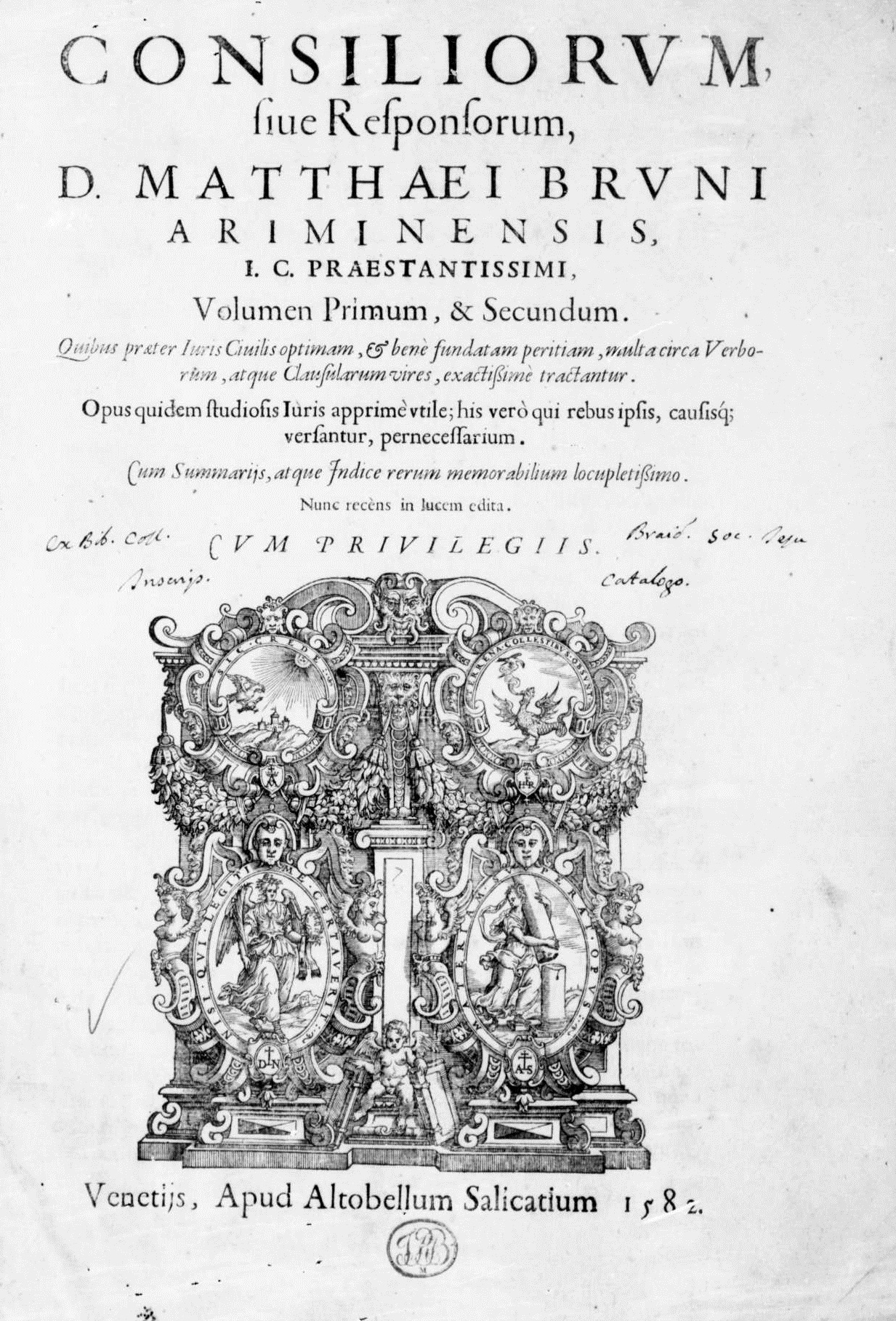 Frontespizio